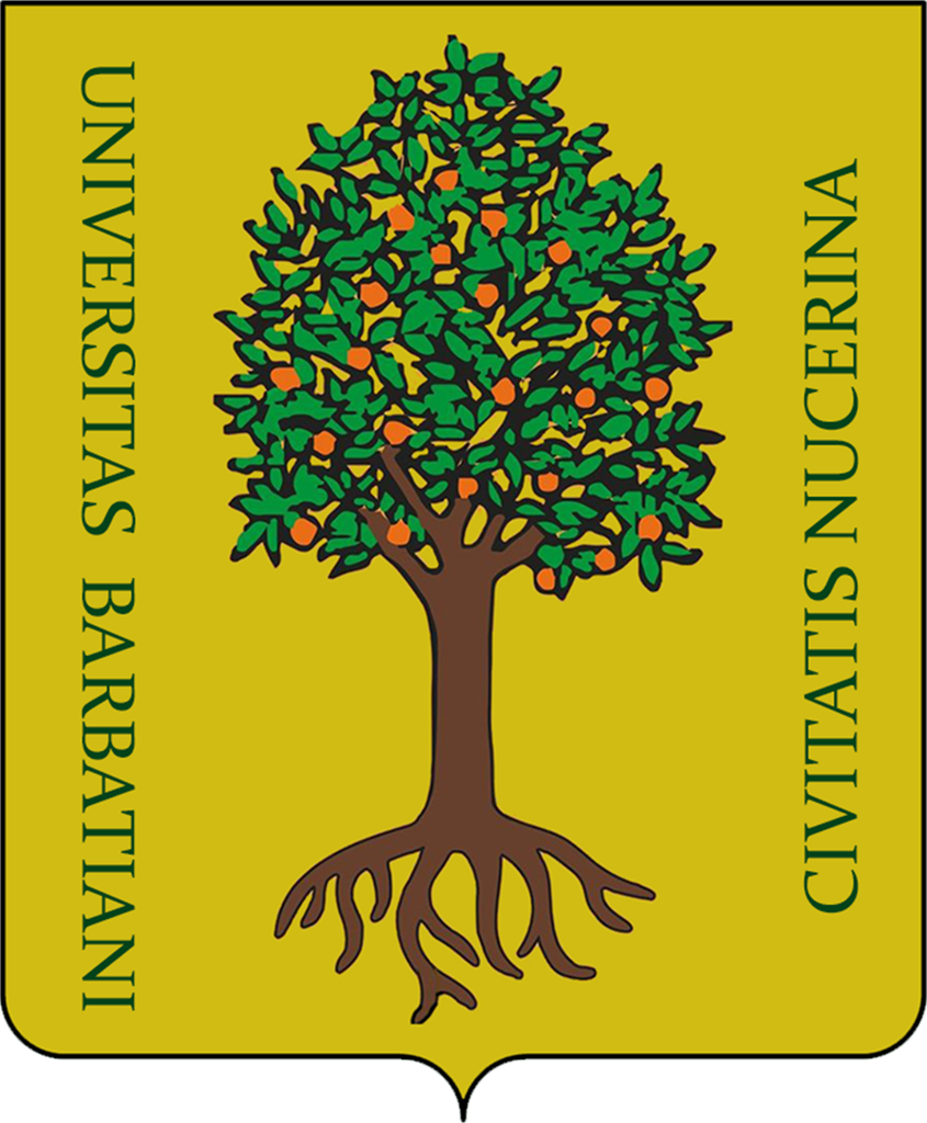 Riadattazione dello stemma dell'antica università di Barbazzano, realizzato seguendo le ricerche storiche usate anche dalle associazioni rievocative del territorio. La riproduzione è approssimata ed ha un puro fine informativo.